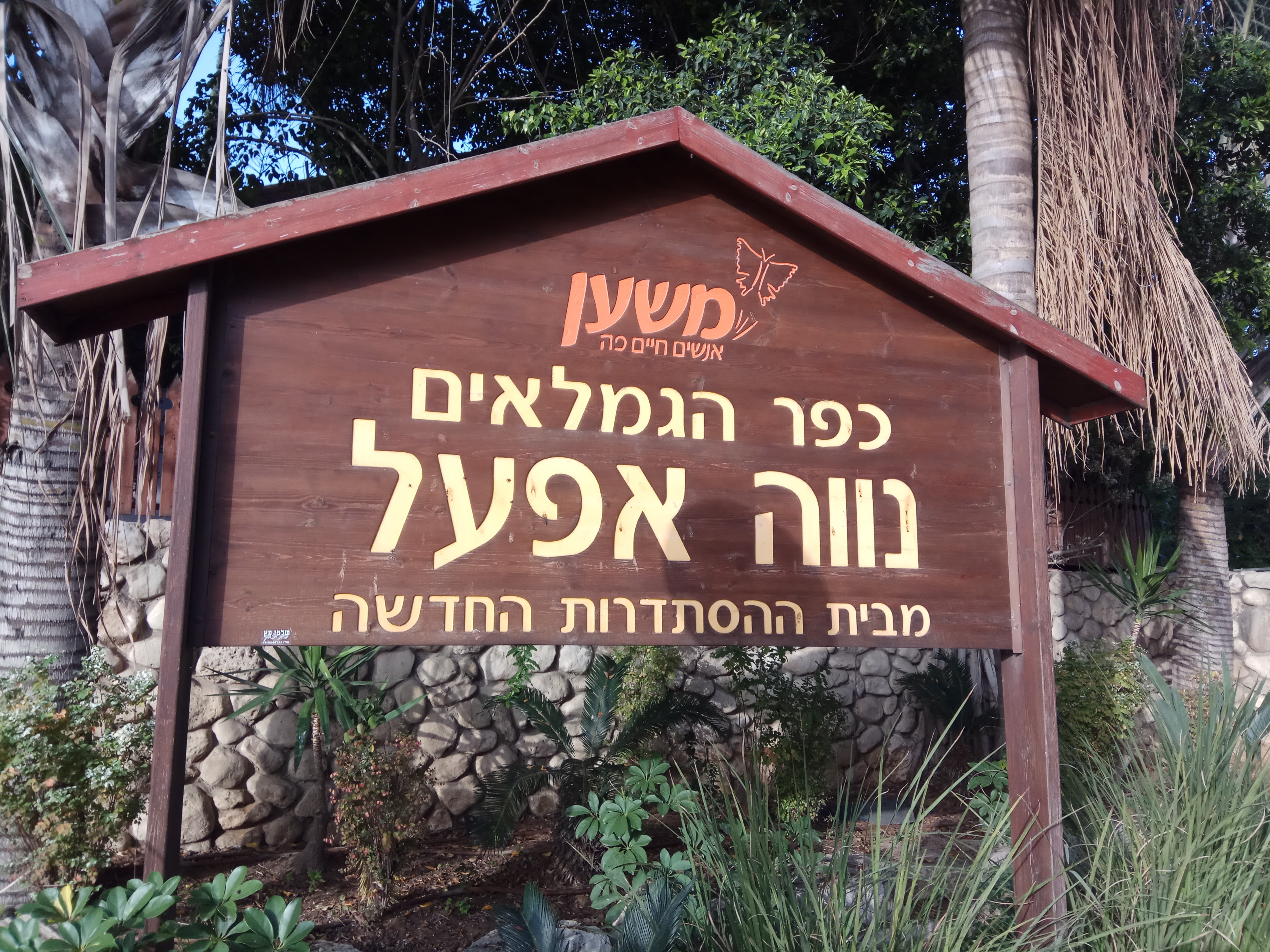 כפר הגמלאים נווה אפעל במקומו של קיבוץ אפעל